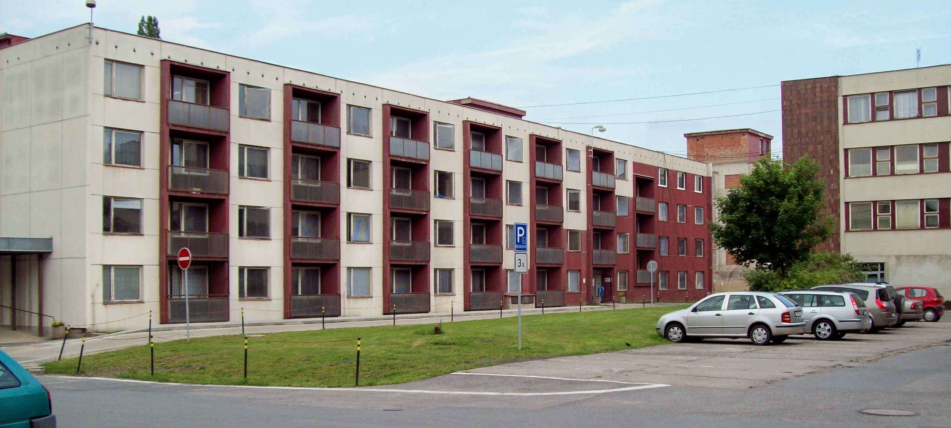 Nemocnice s poliklinikou Mělník, v pavilonu T se nachází Gynekologicko-porodnické oddělení. Vpravo část budovy polikliniky.